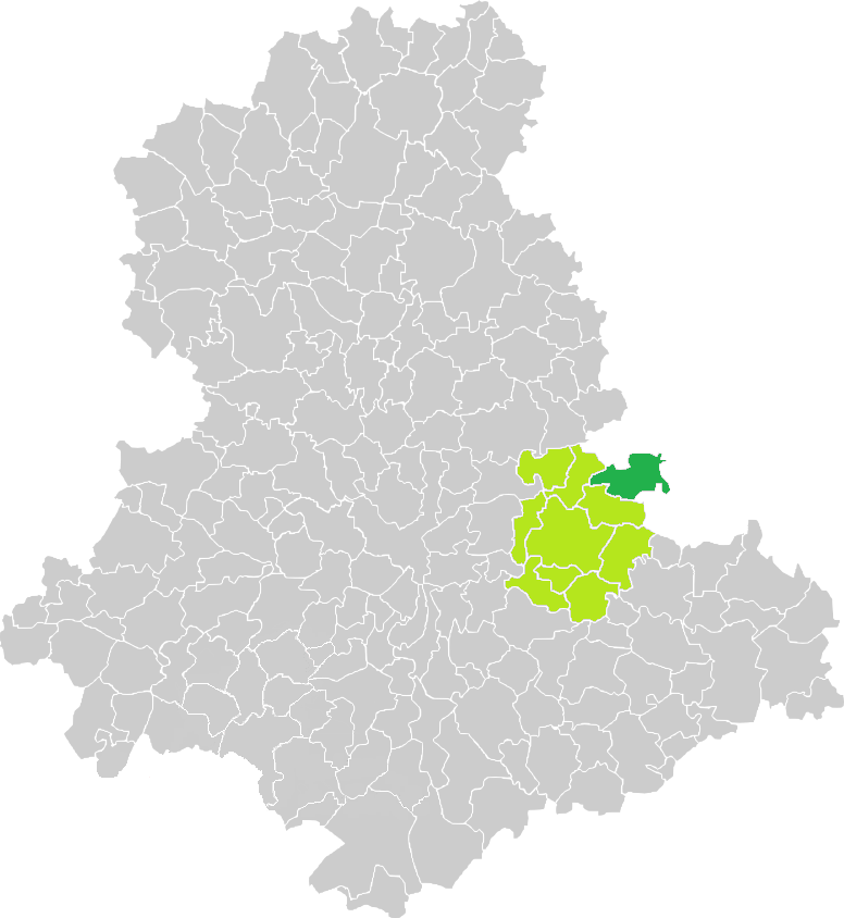 Carte de situation de la commune de Sauviat-sur-Vige (en vert foncé) dans le votre Canton (en vert clair) sur une carte des communes de la Haute-Vienne